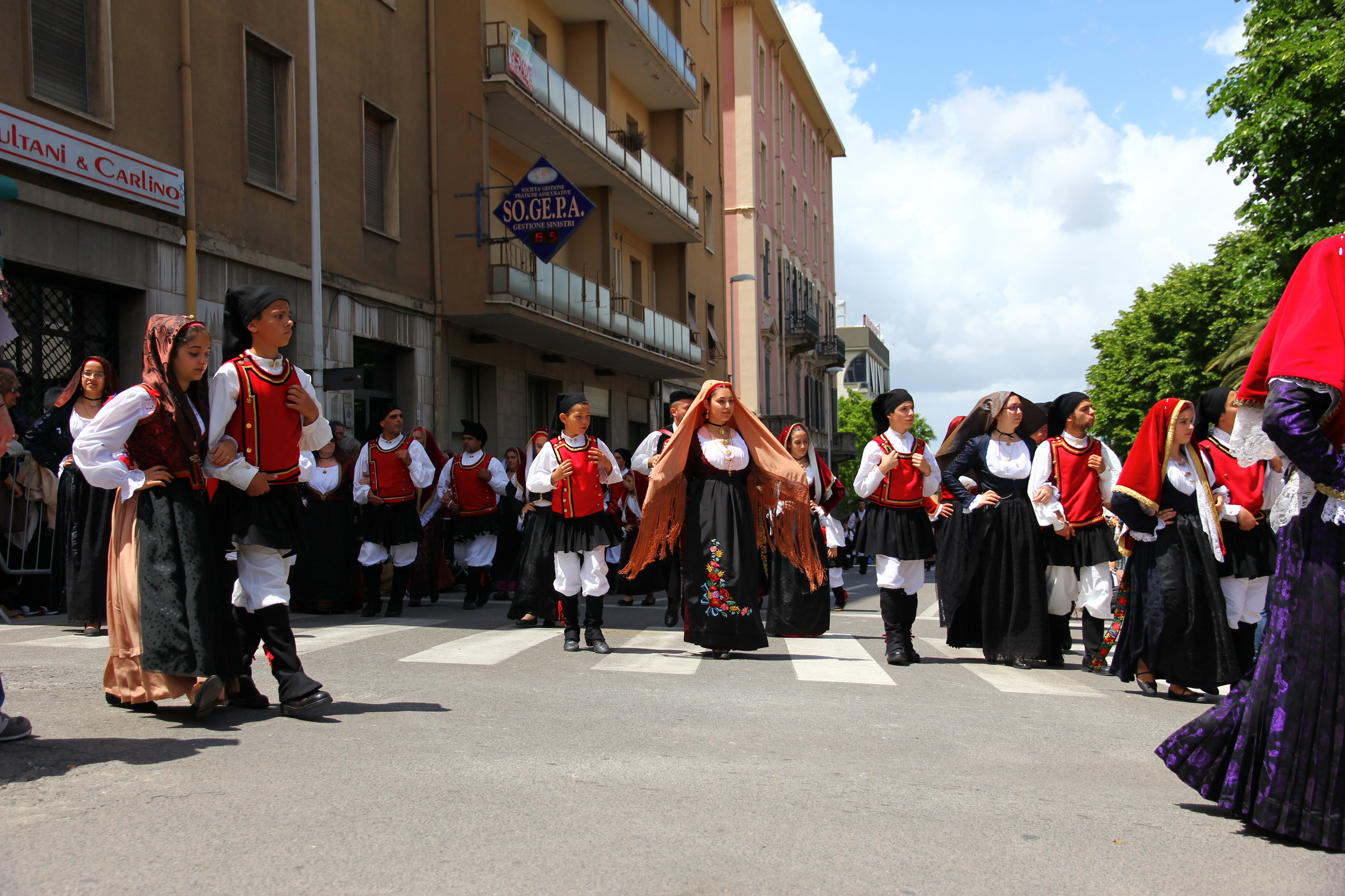 Cavalcata Sarda 2013 (Sassari)